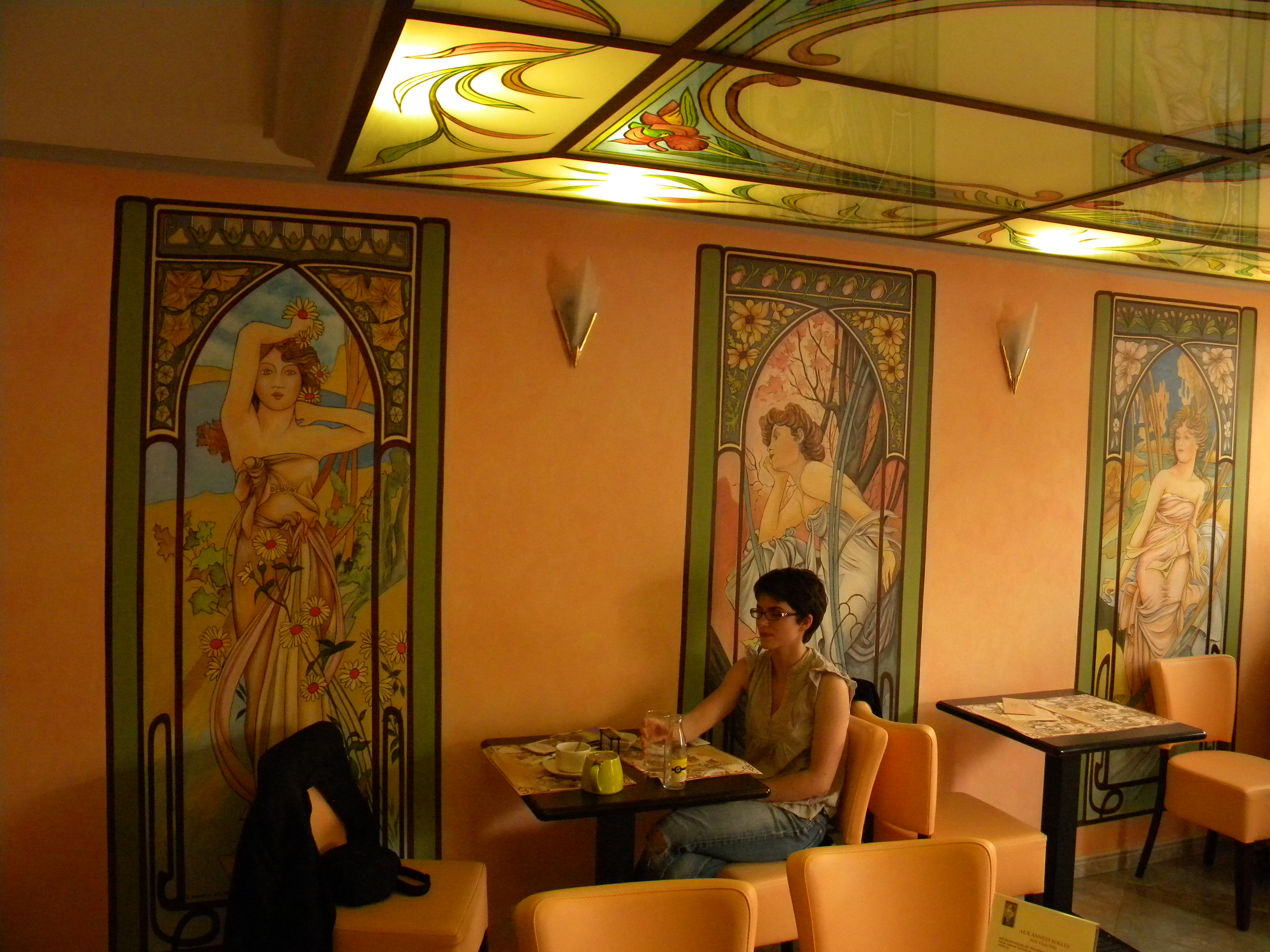 teejo